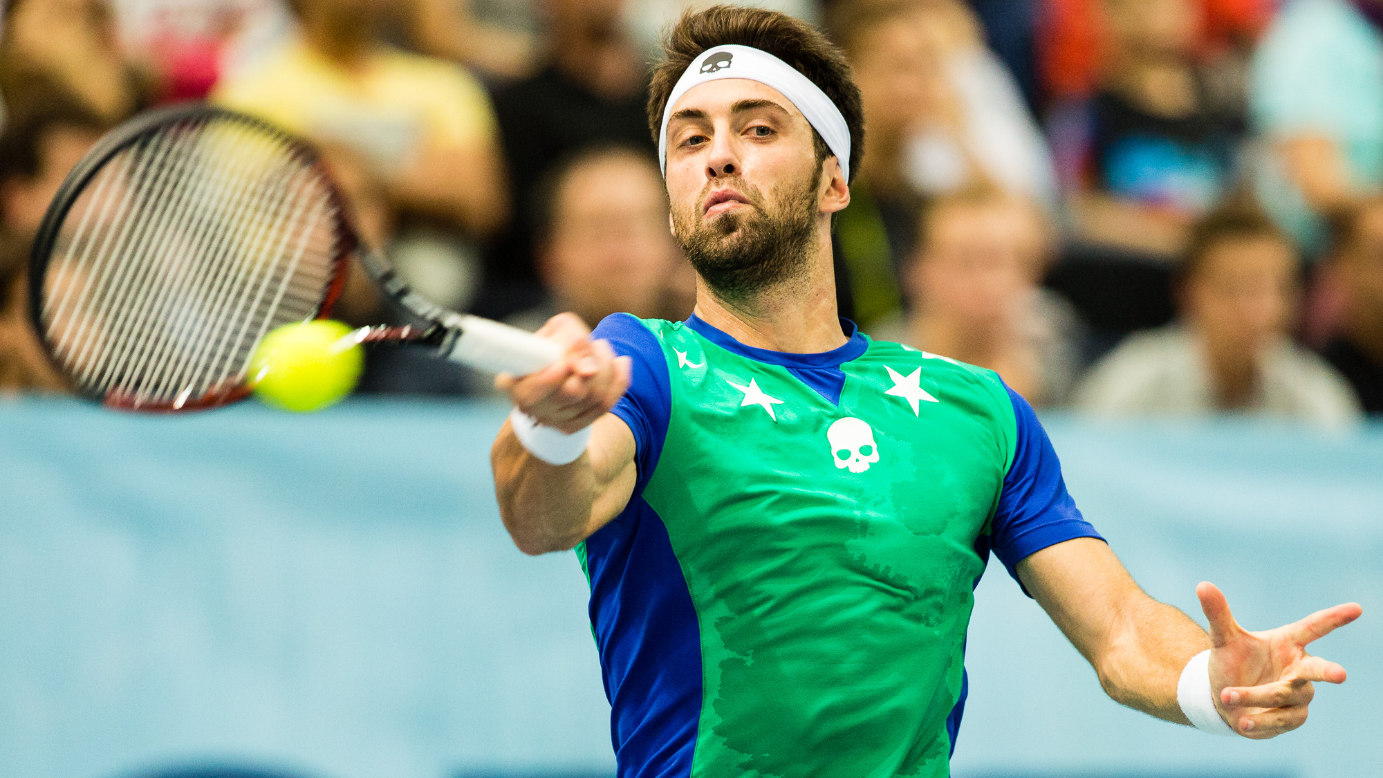 Nikoloz Basilashvili (GEO) spielt gegen Radu Albot (MDA) in Qualifikation zu Erste Bank Open ATP World Tour 500 in Wien am 23.10.2016